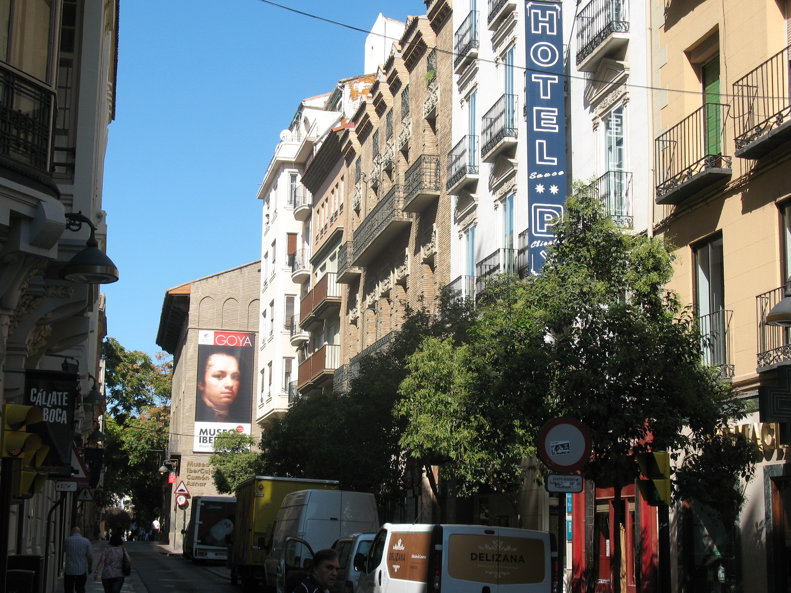 Музей Гойа в Сарагосе